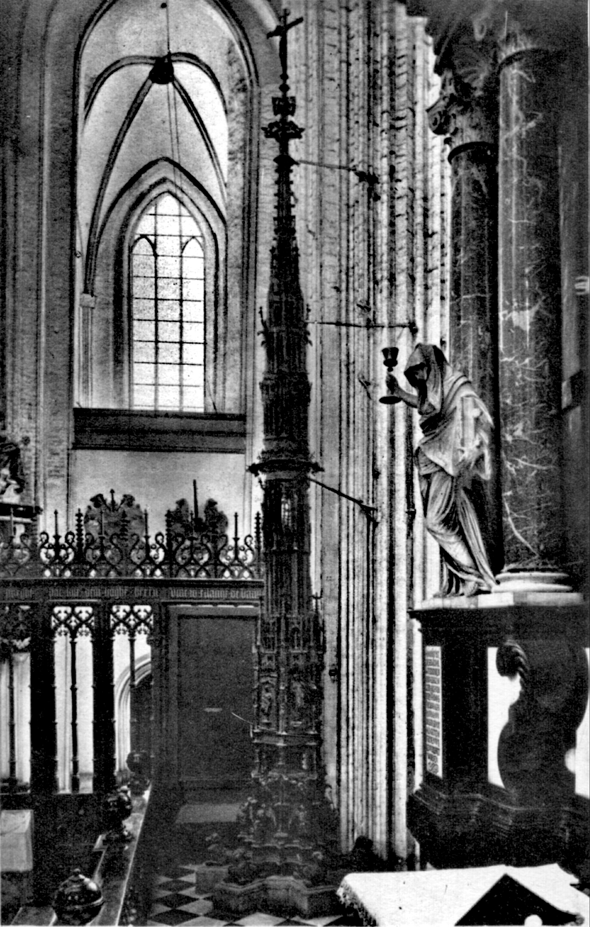 Sakramenthaus, Bronze, 1476-79, von Goldschmied Klaus Rughese (Entwurf?) und dem Rotgießer Klaus Grude (Guß). Ergänzungen von 1853/55.